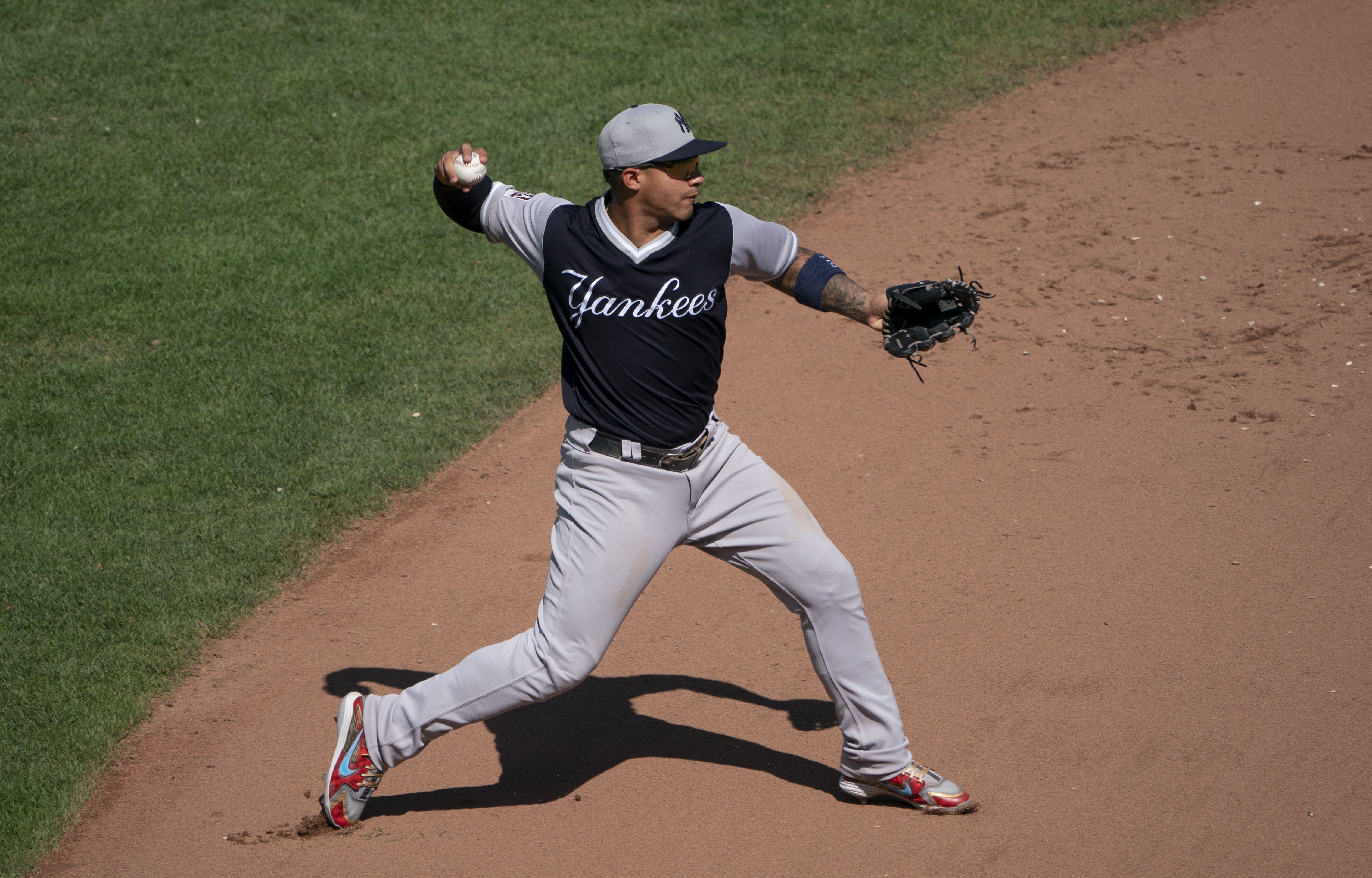 Yankees at Orioles 8/25/18